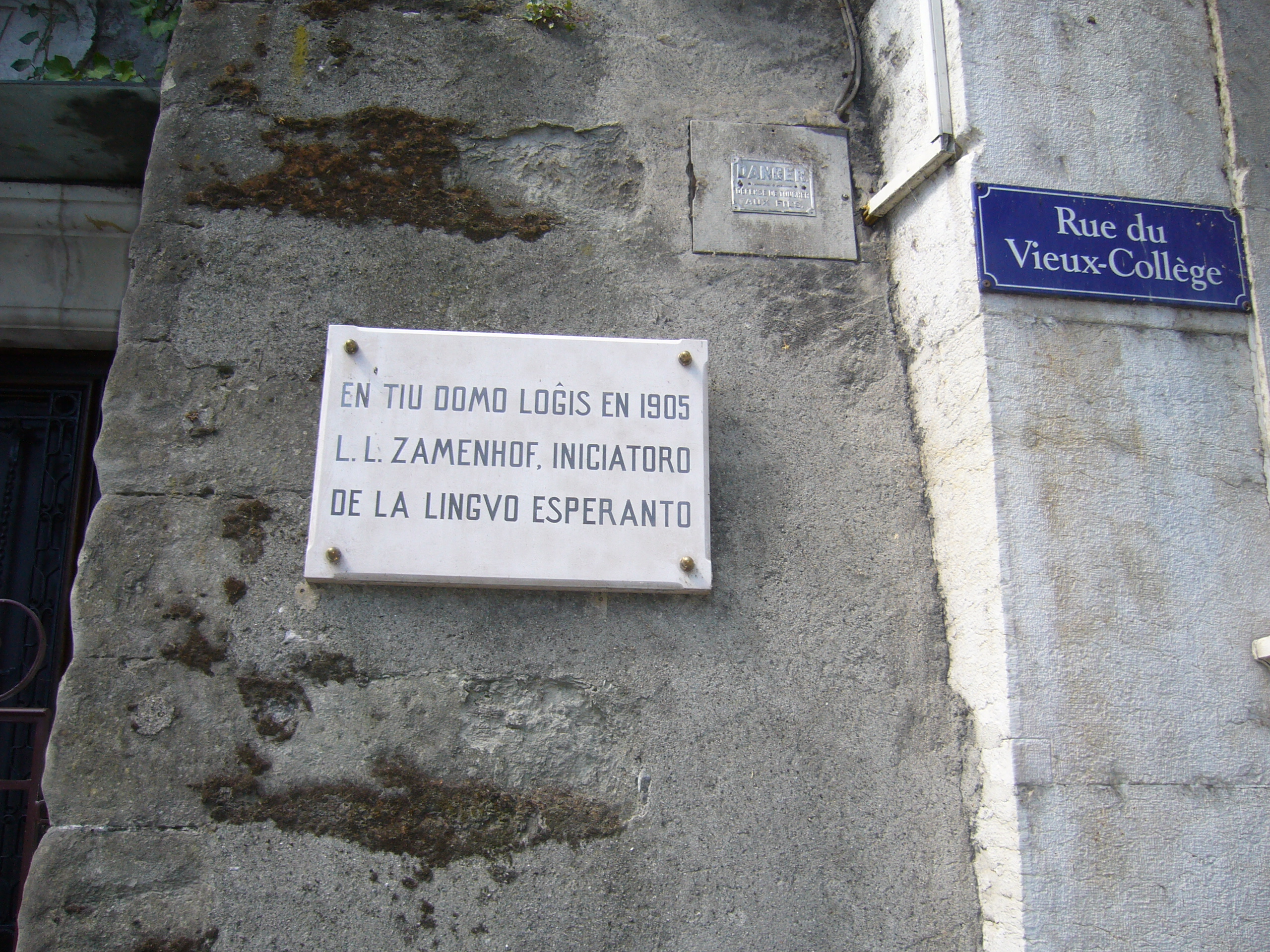 Plaque commémorative apposée sur la maison de Genève dans laquelle le linguiste Zamenhof séjourna en 1905, lors de son séjour en Suisse.